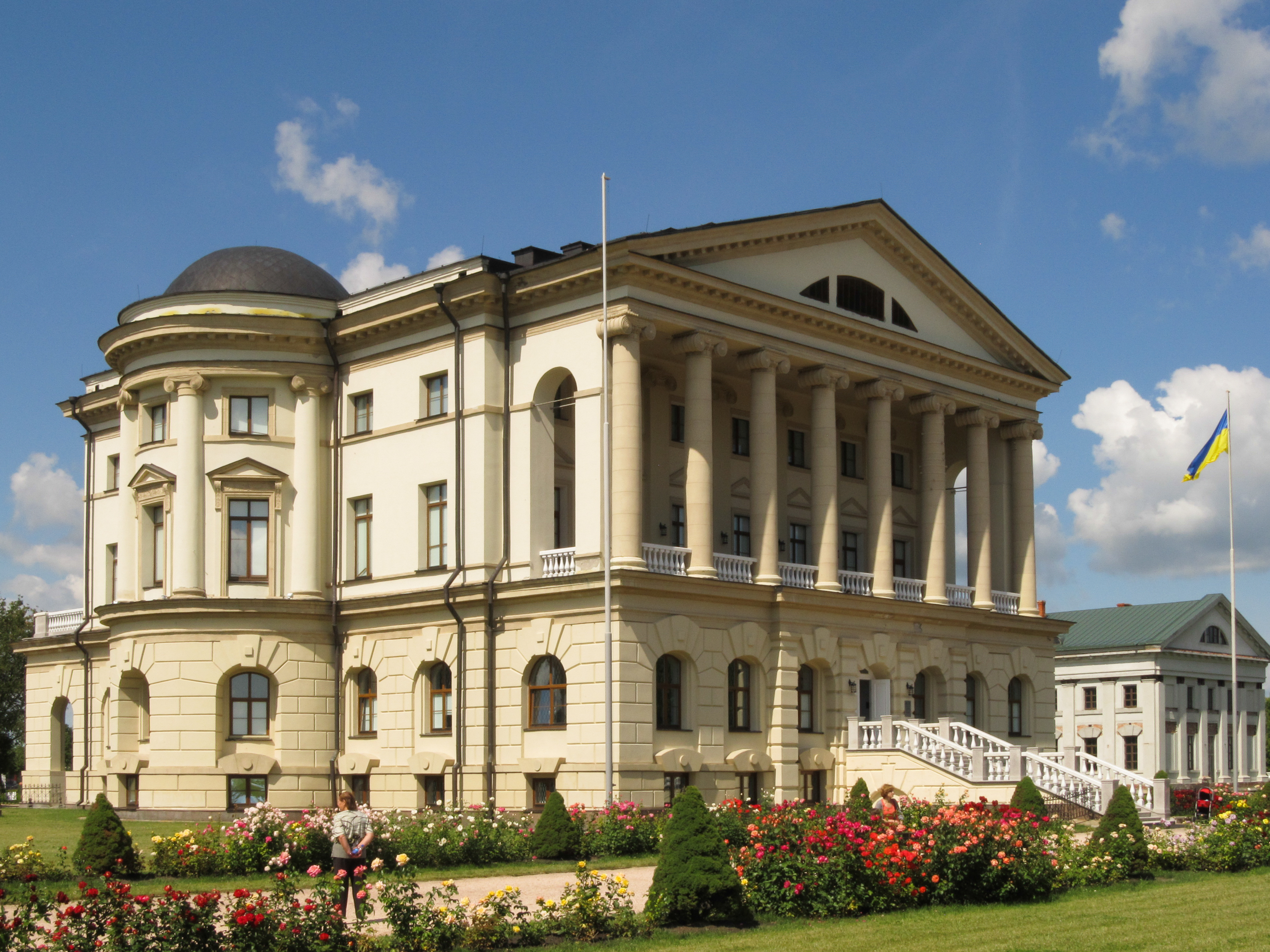 Палац К.Розумовського (мур.), Батурин, вул.Набережна, 1